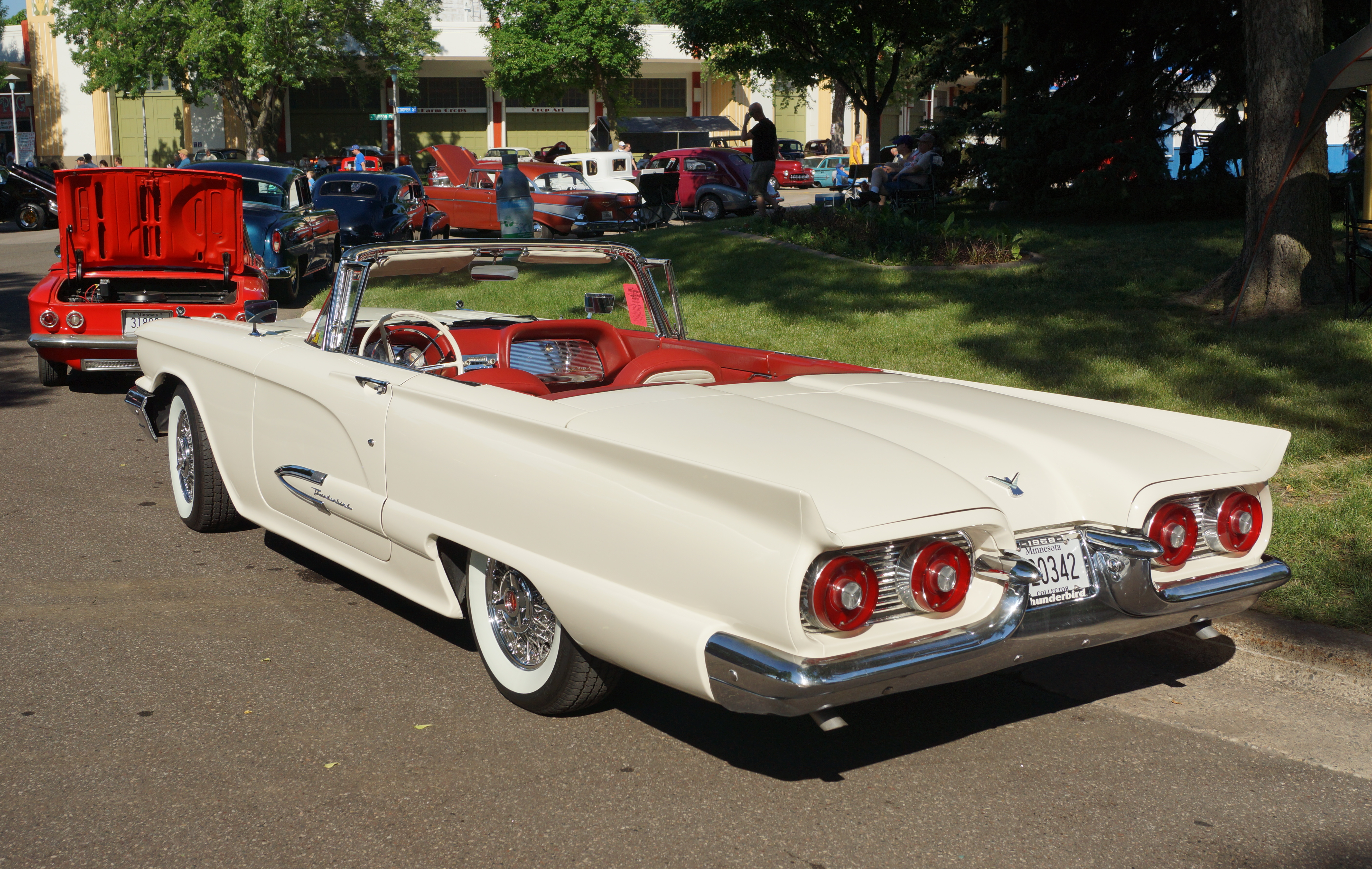 1959 Ford Thunderbird Convertible